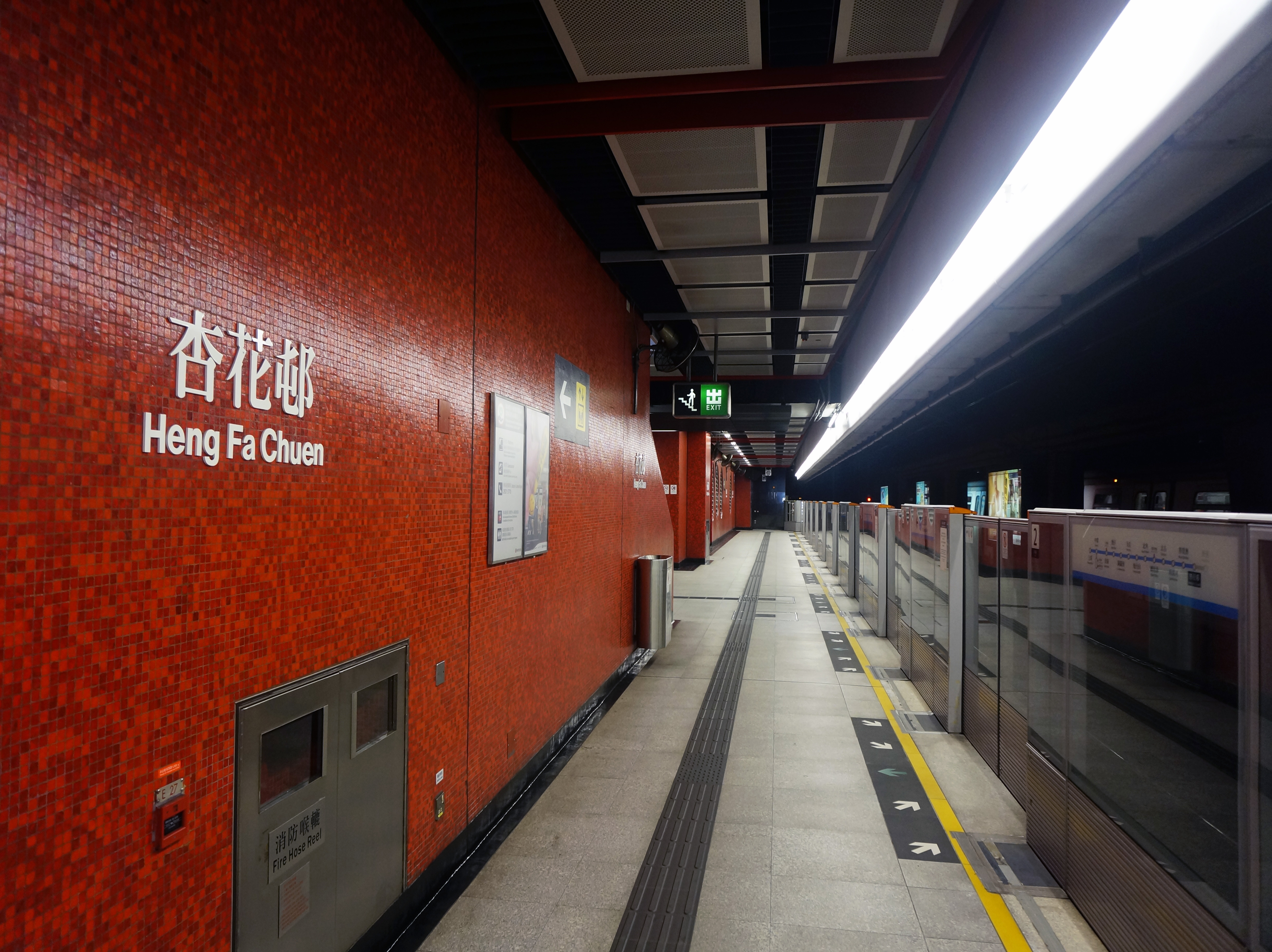 港鐵杏花邨站月台